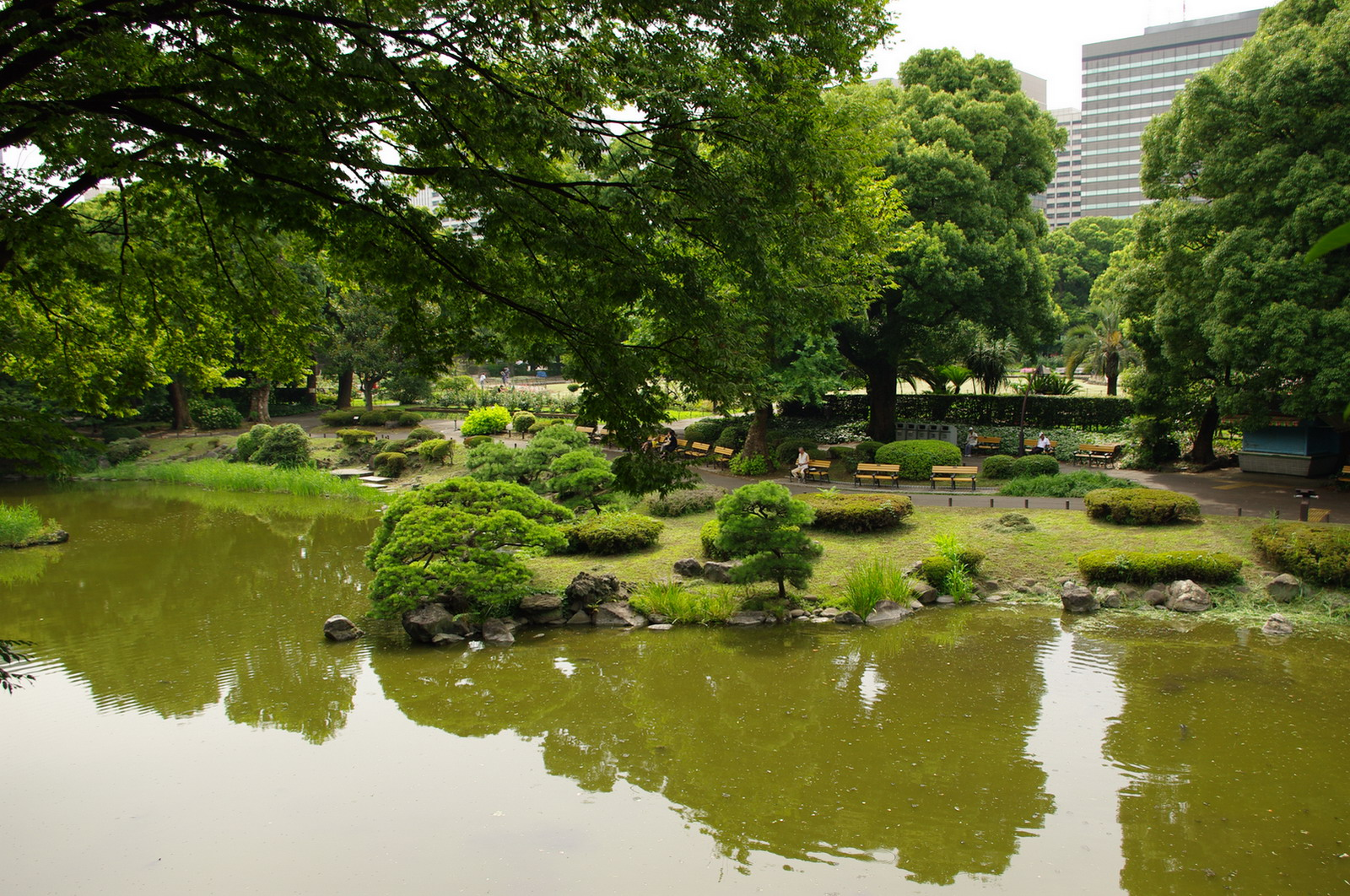 Hibiya-Park in der Nähe des Kaiserpalastes